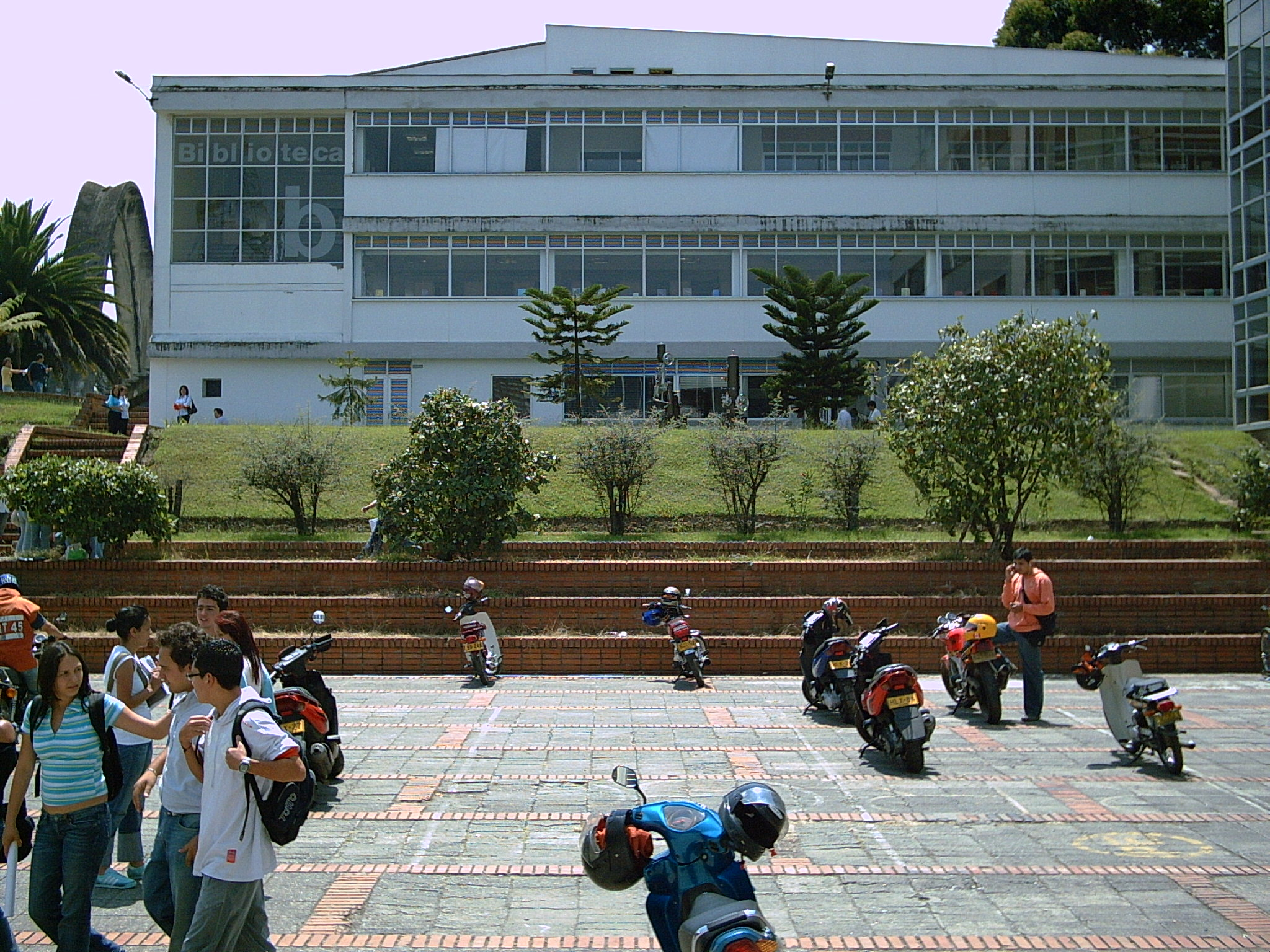 Library. Universidad Nacional de Colombia, at Manizales.